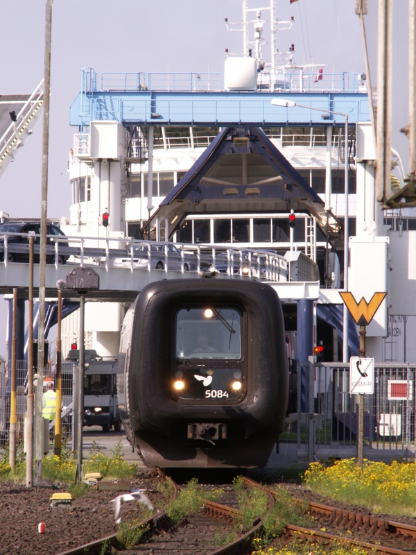 Inselbahn-fehmarn